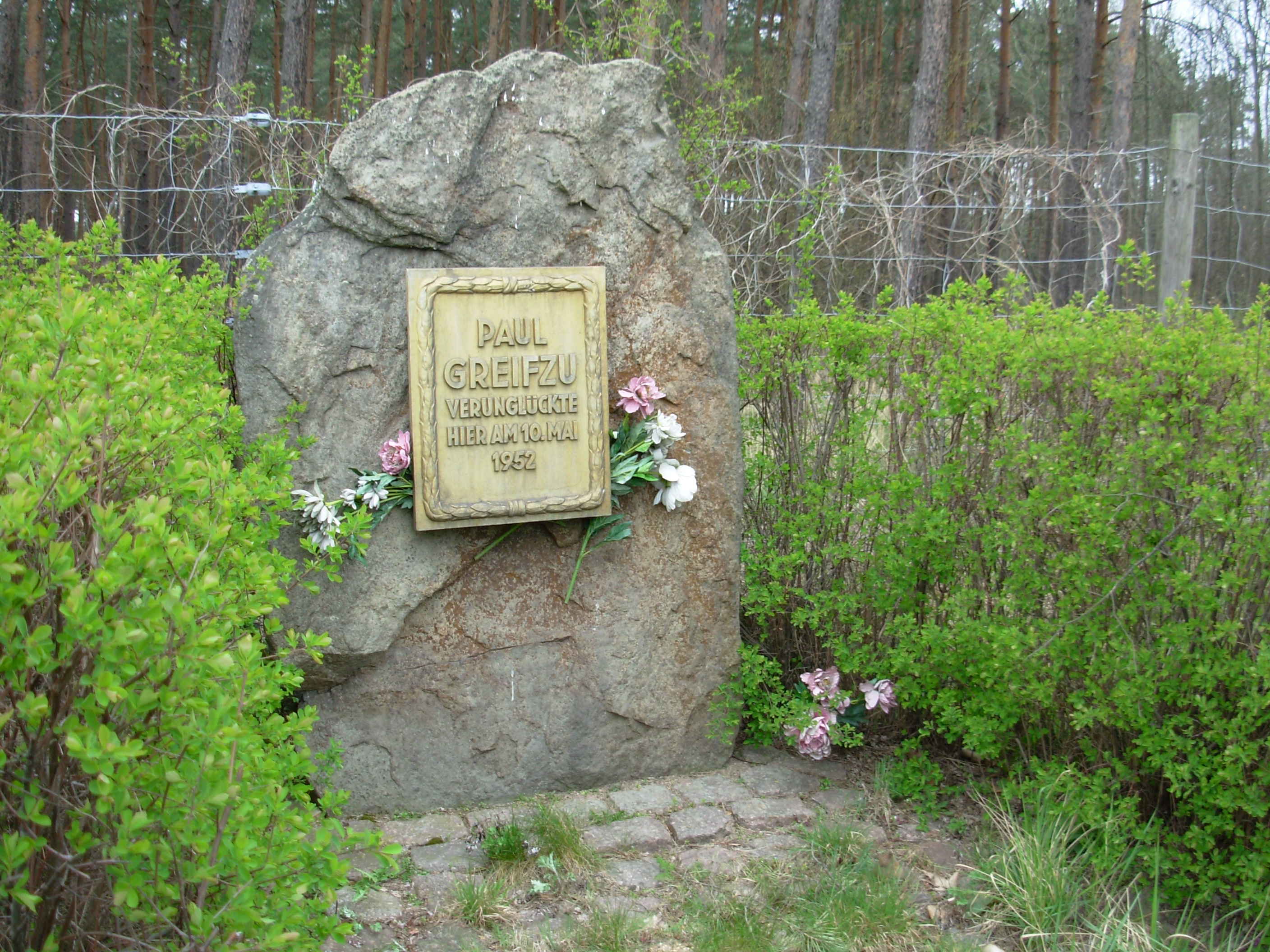 Memorial for Paul Greifzu; Paul Greifzu Gedenkstein an der Rennstrecke Dessau am Unglücksort. Versetzt 2012 in das Paul-Greifzu-Stadion Dessau.